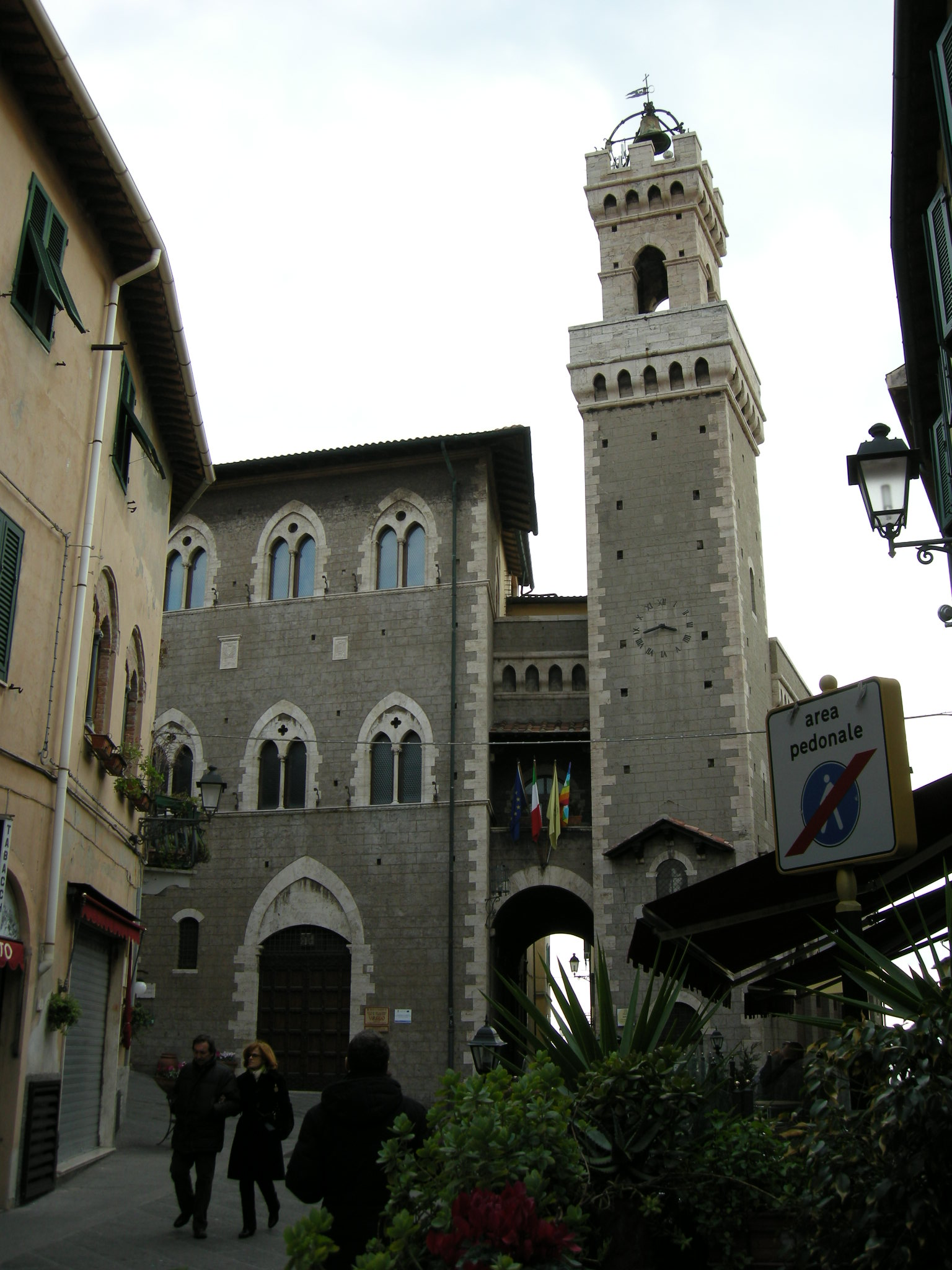 Palazzo del comune di piombino